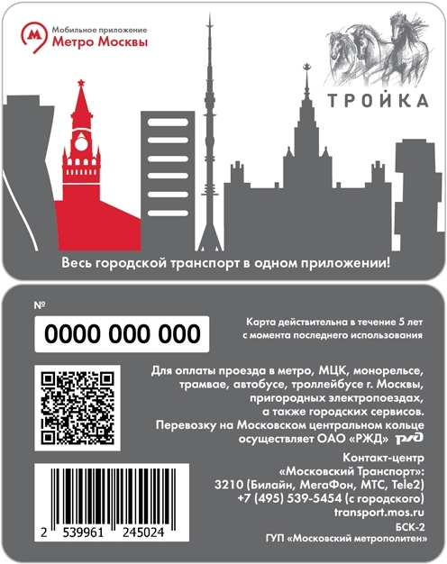 Карта Московского городского транспорта Тройка со стилизованным изображением примечательных городских зданий